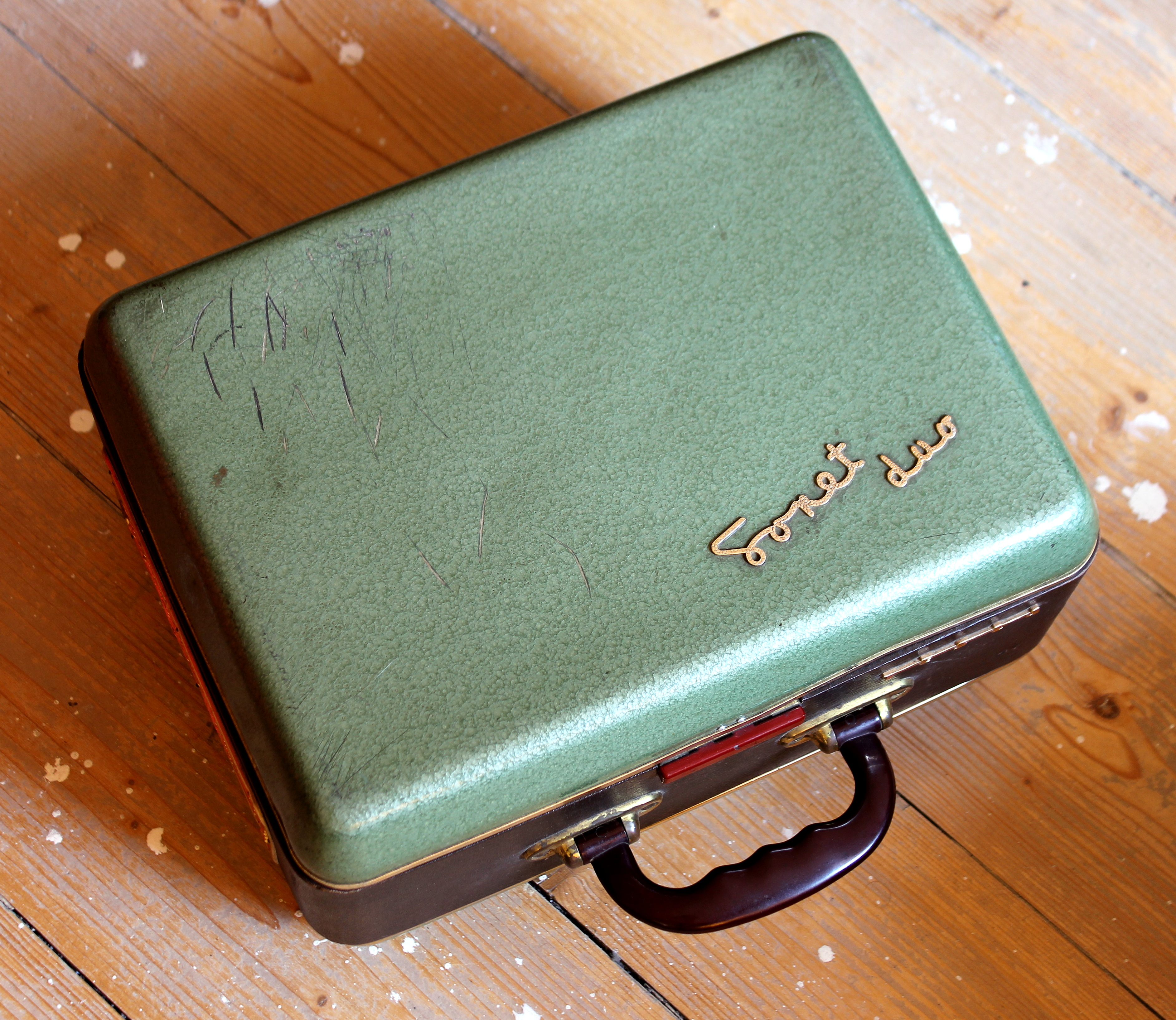 Kotoučový magnetofon Sonet Duo.